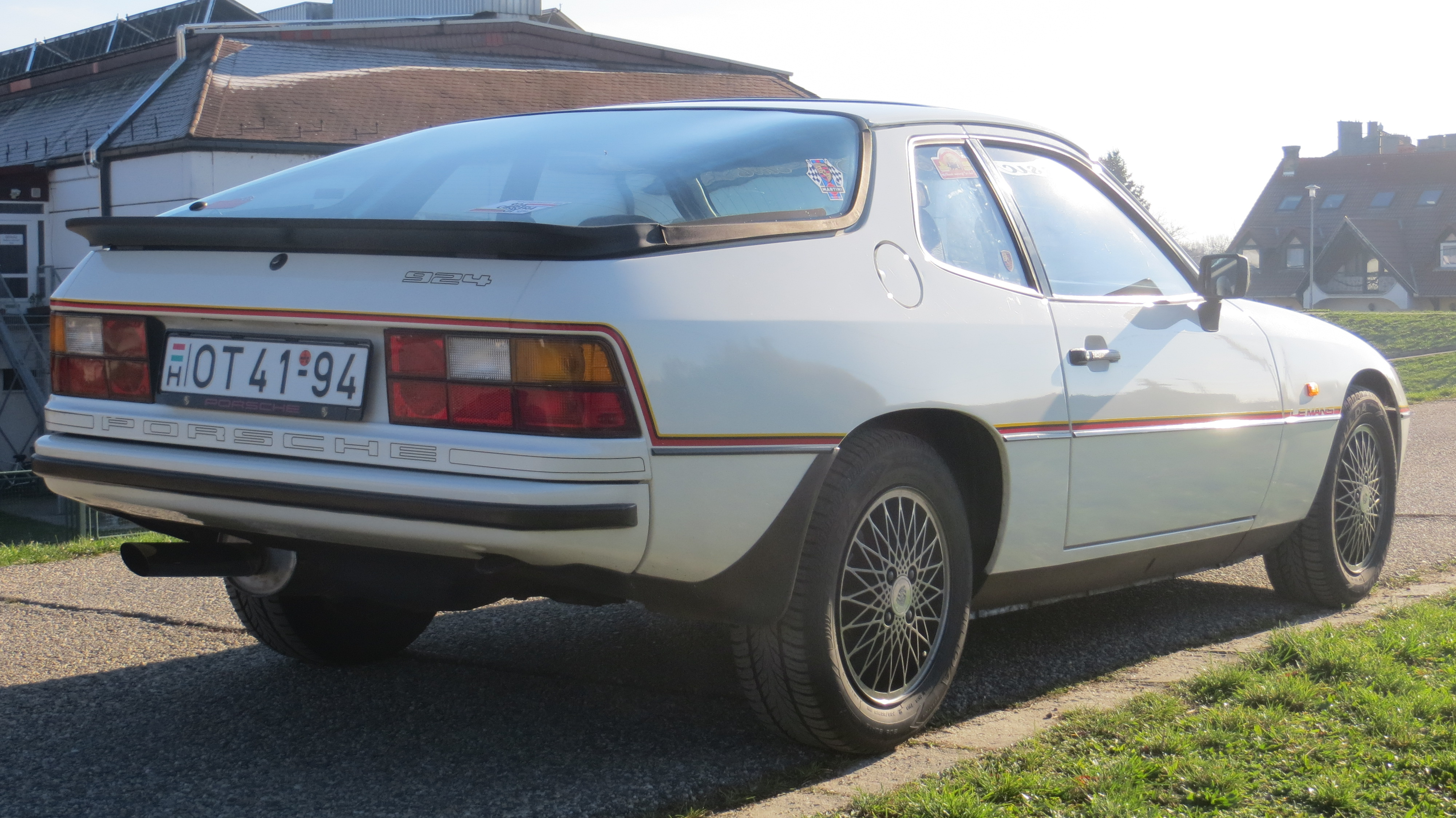 Ez a különleges modell a Porsche Le Mans-i 24 órás autóversenyeken elért hatalmas sikerei előtti tisztelgés. Összesen 1002 darab (más források szerint 1030) épült a modellből, mindegyik alpesifehér színben, körbefutó sárga-fekete-vörös díszítő csíkkal, az első sárvédőkön ugyanilyen színű Le Mans felirattal. A modellen a 924 Turbo hátsó spoilere van, 6J×15-ATS Turbo-Look keréktárcsák, belül csíkos „Nadelstreifen” kárpitozású Turbo ülések fehér szegéllyel, 36 cm átmérőjű négyküllős bőrkormány, bőr váltógomb, az ajtóküszöbön fekete alapon fehér 924 felirat. A gépkocsihoz többféle extrát is lehetett rendelni, elektromos ablakot, elektromosan állítható külső tükröket, hátsó ablaktörlőt, fényszórómosót, légkondicionálót és kivehető targatetőt is. Jobbkormányos kivitelben 100 darab készült.